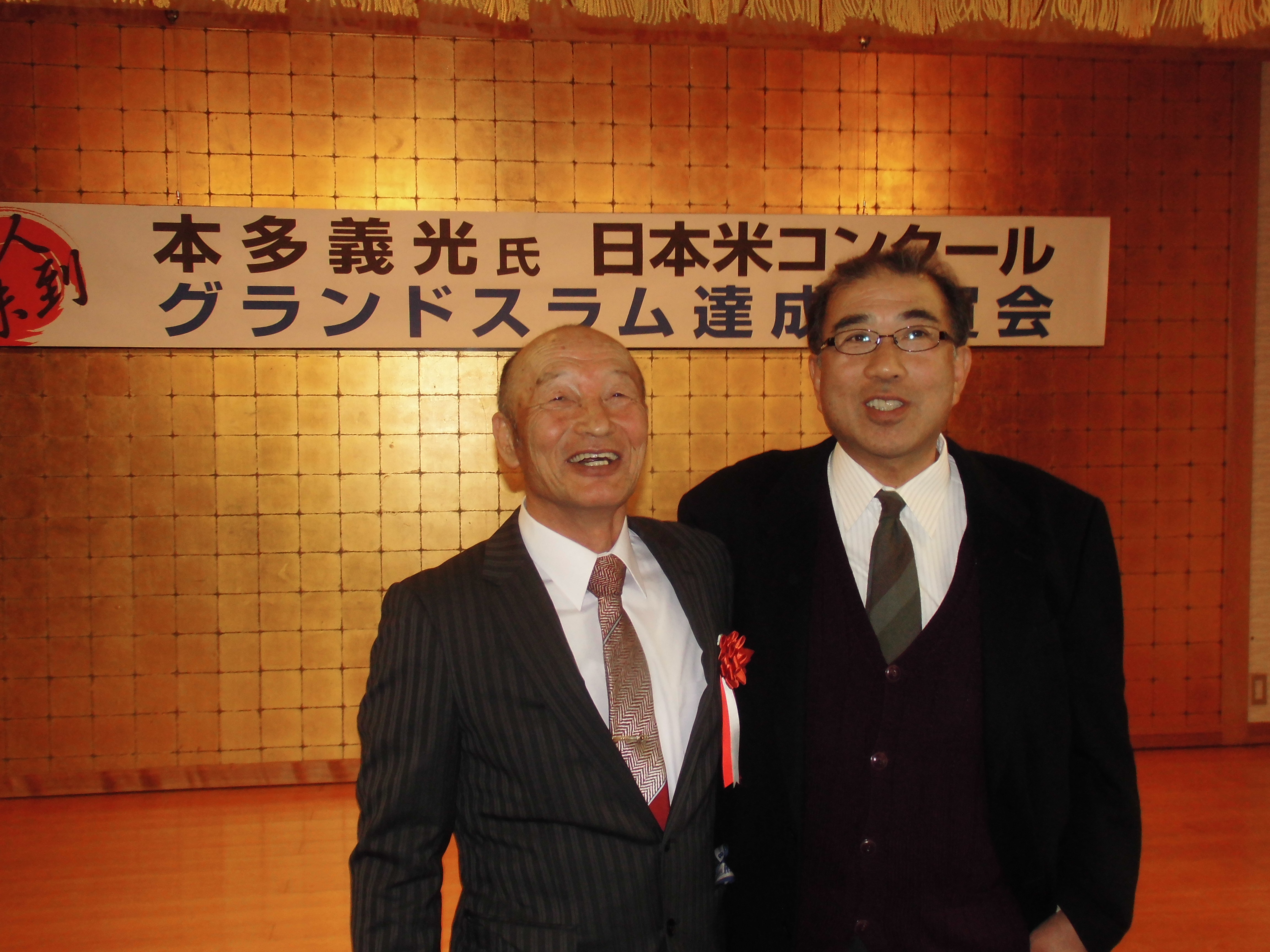 本多義光氏 日本米コンクール グランドスラム達成祝賀会（右は、弟子の細金剛）